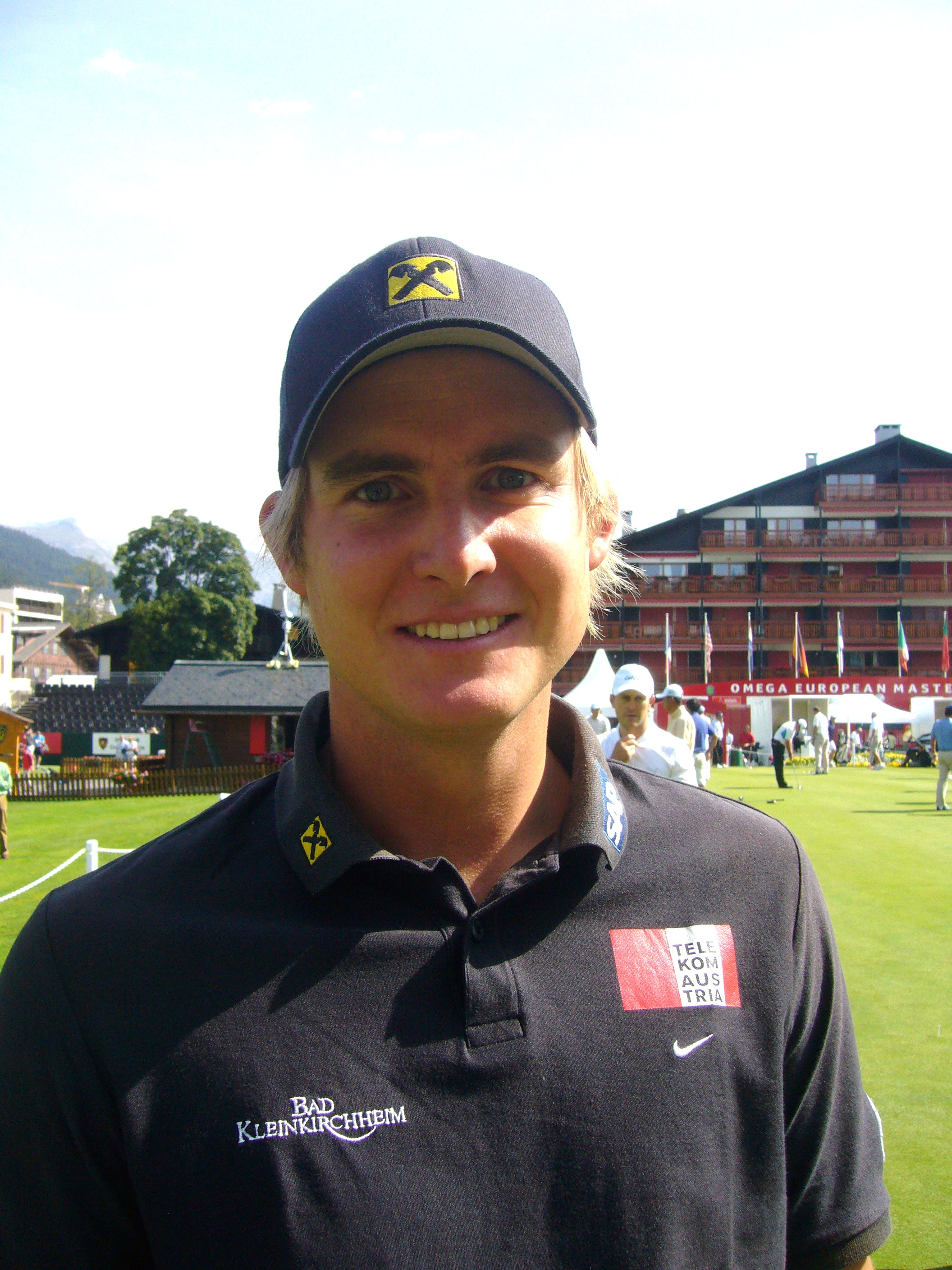 Florian Praegant, Oostenrijks golfer